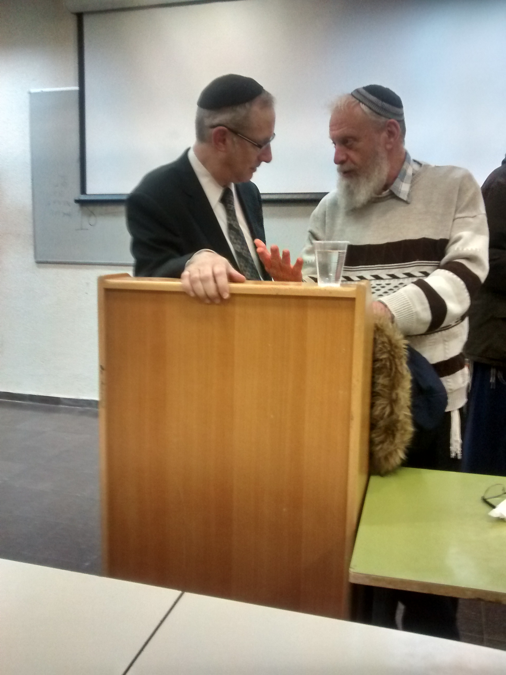 הרב יואל בן-נון והרב מיכאל רוזנצוויג